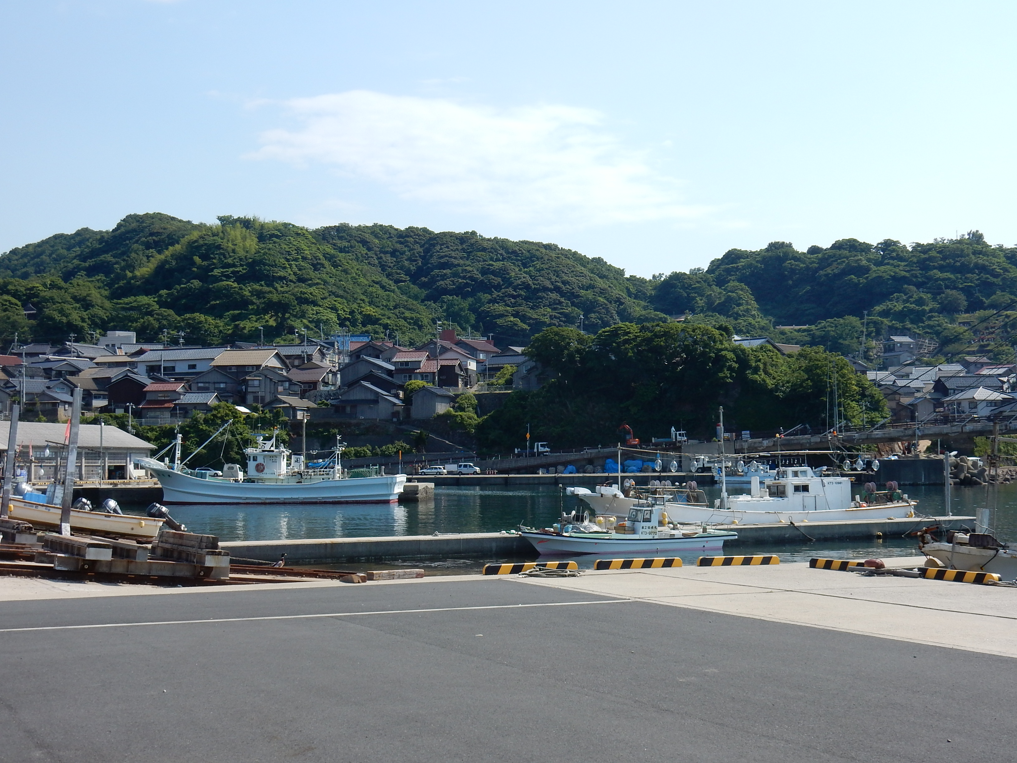 京都府京丹後市丹後町間人の風景